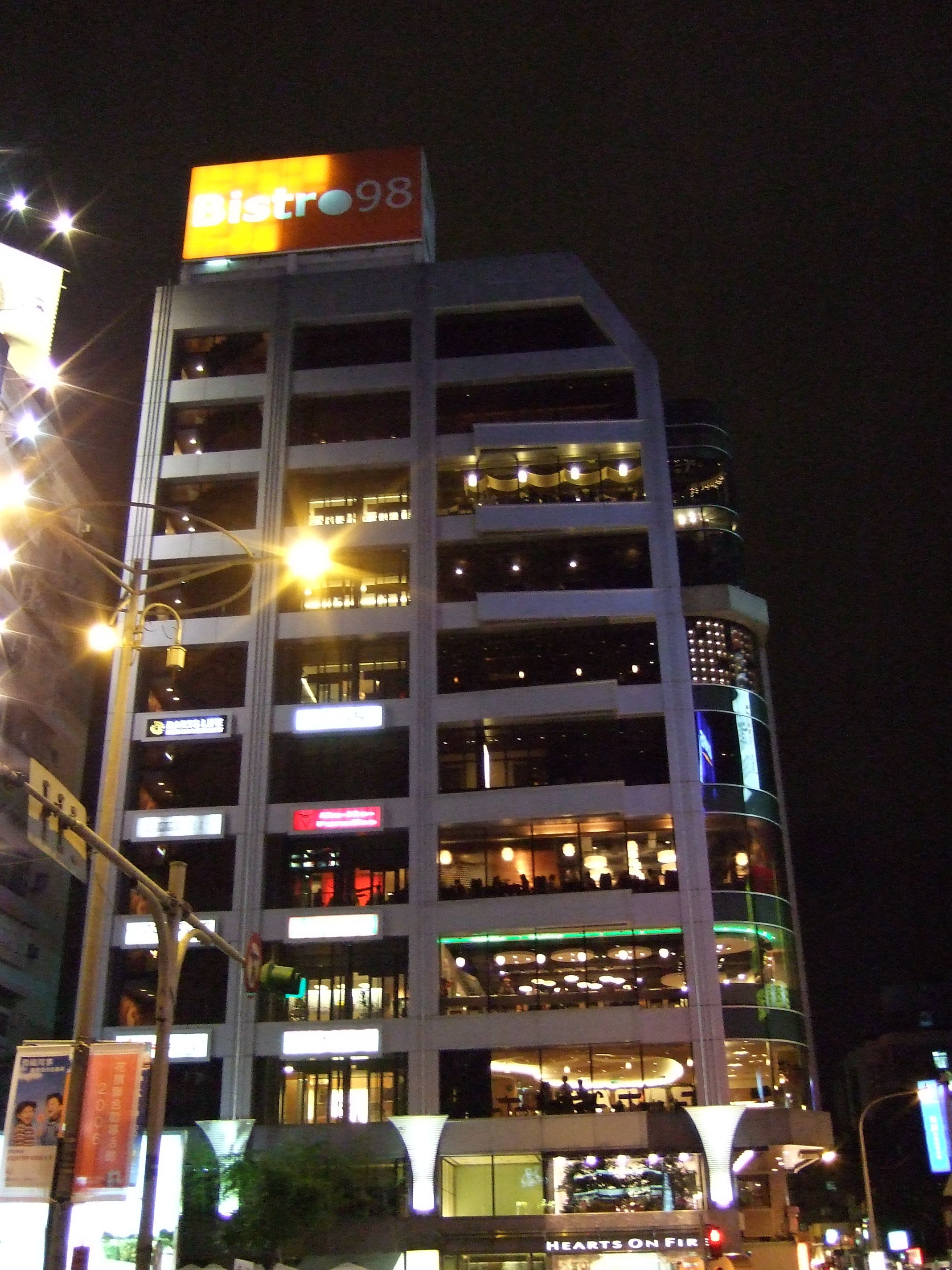 Bistro 98，位於臺北市大安區忠孝東路四段98號。